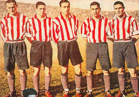 Los Profesores, recordada línea delantera de Estudiantes en el comienzo de la era profesional: Miguel Angel Lauri, Alejandro Scopelli, Alberto Zozaya, Manuel Ferreira, Enrique Guaita.